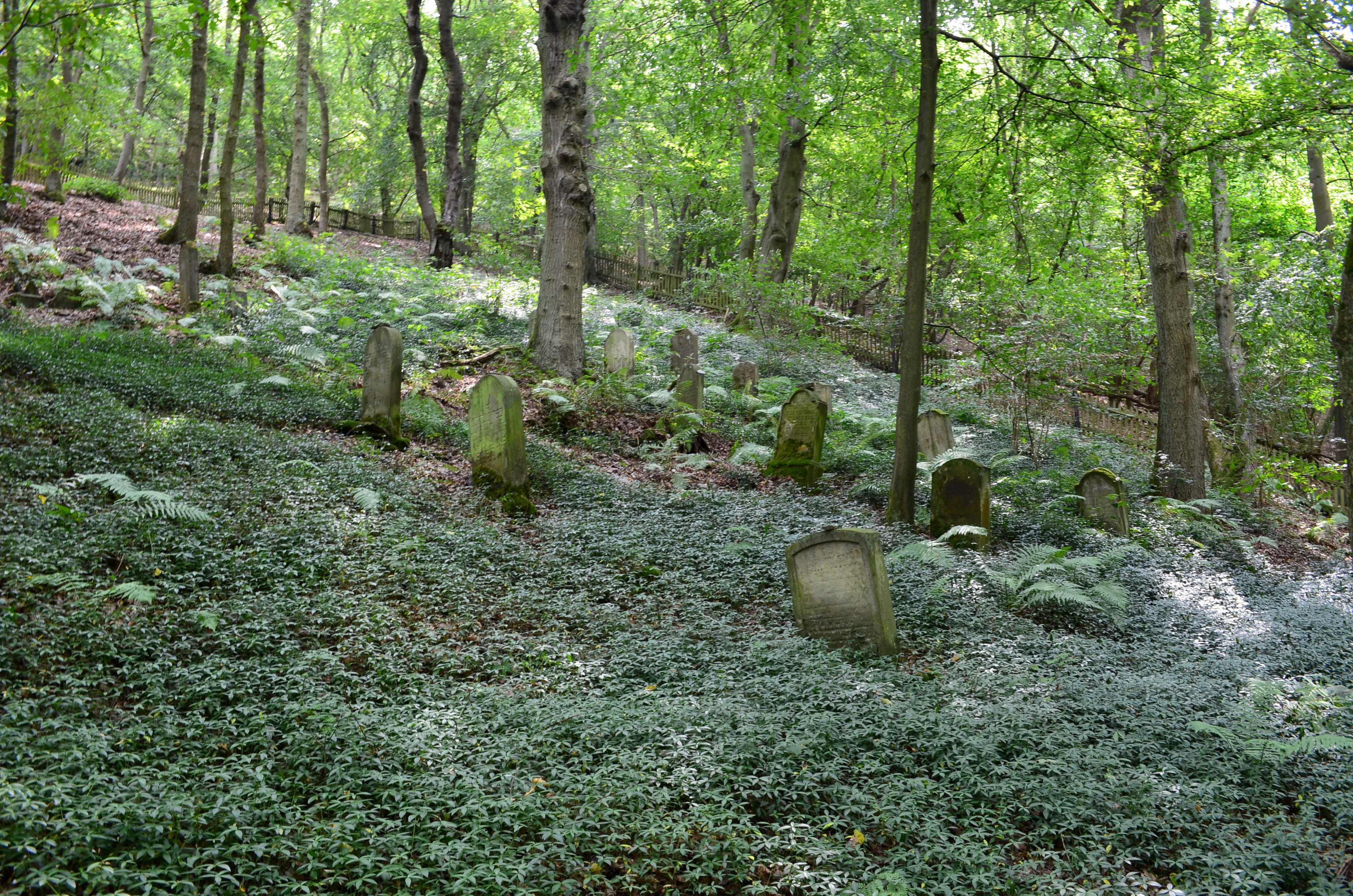 Joodse begraafplaats (Holzfeld) van de gemeente Hirzenach